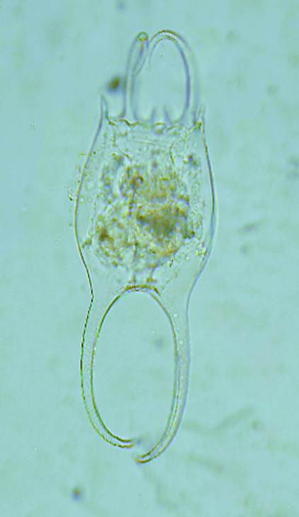 Brachionus falcatus é uma espéciezooplanctônica de Rotifera comumente encontrada em ambientes eutróficos.